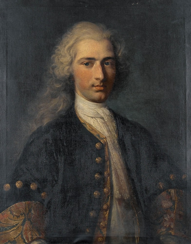 Bildnis Niklaus Tscharner (1694-1721), Offizier